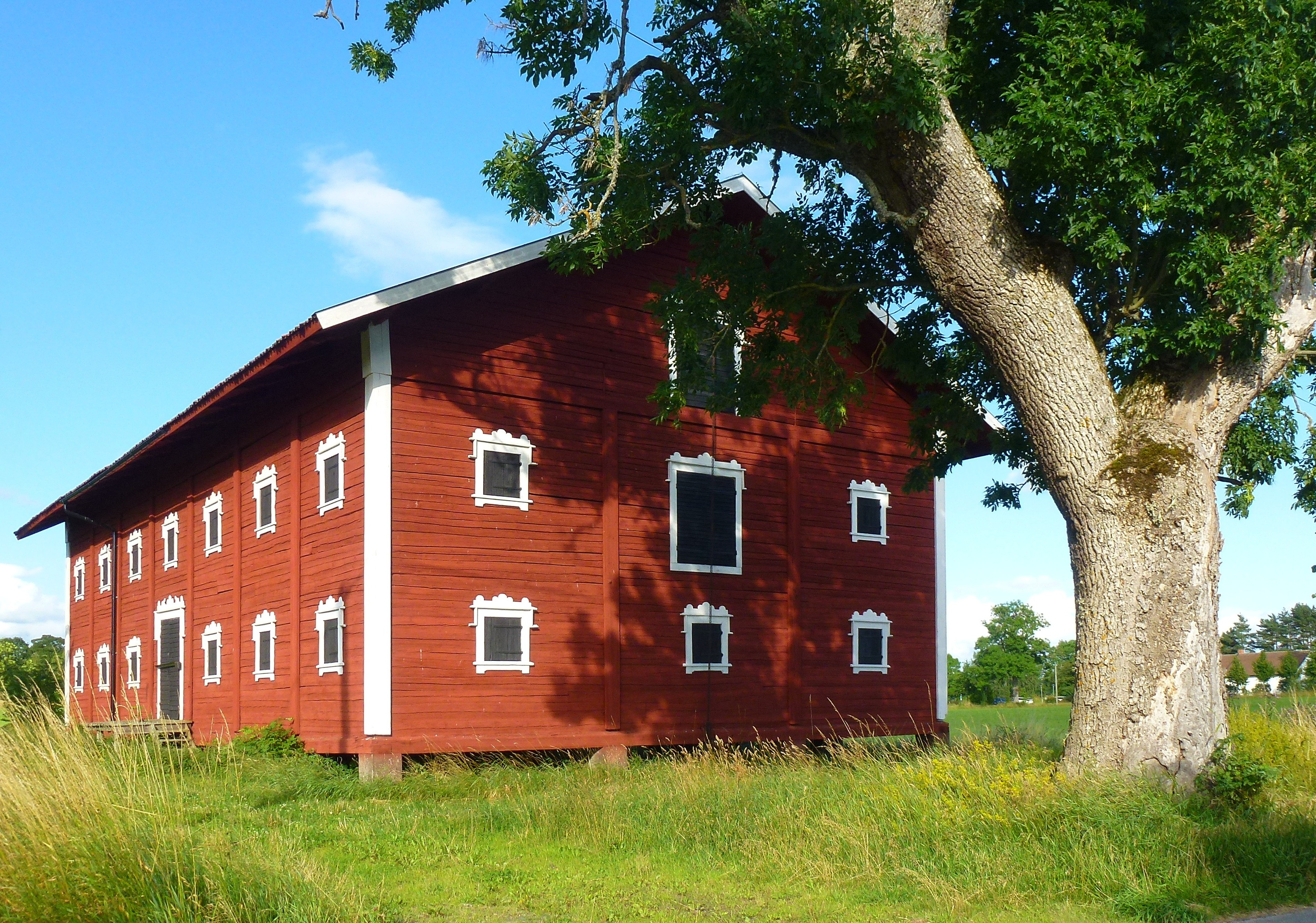 Rånäs slott, magasin